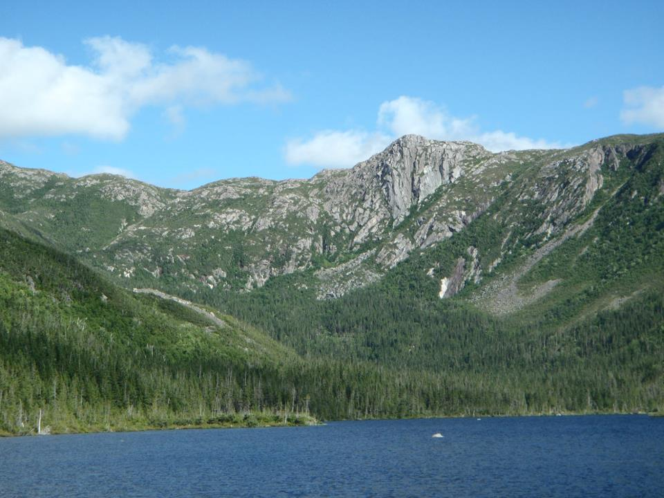 Lac aux Américains, parc national de la Gaspésie, Québec